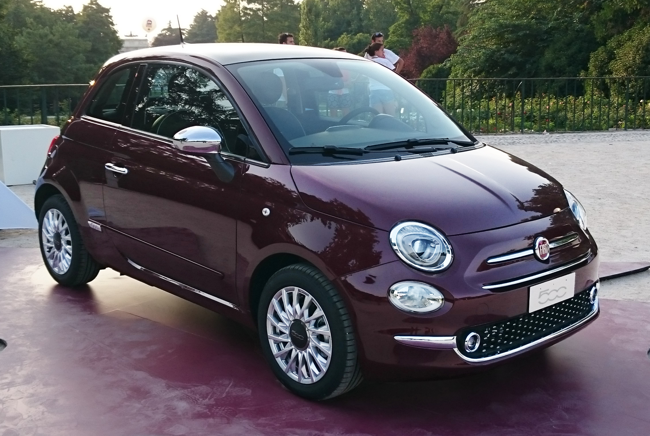 Il restyling della Fiat 500 nel luglio 2015 esposta al Parco Sempione di Milano (Castello Sforzesco). Alla presentazione erano presenti un modello viola e un modello bianco